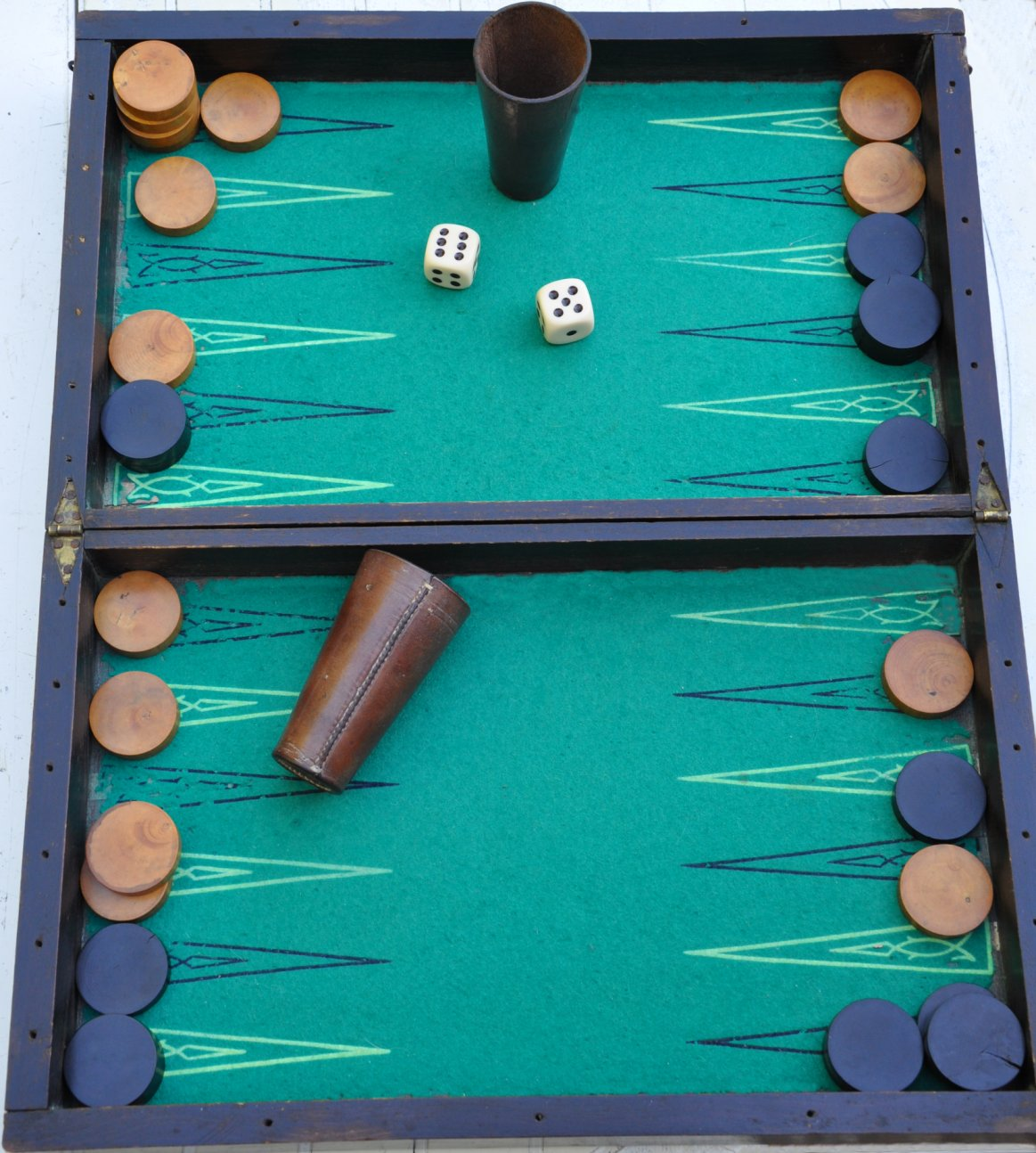 Jeu de jacquet français du début du XXe siècle